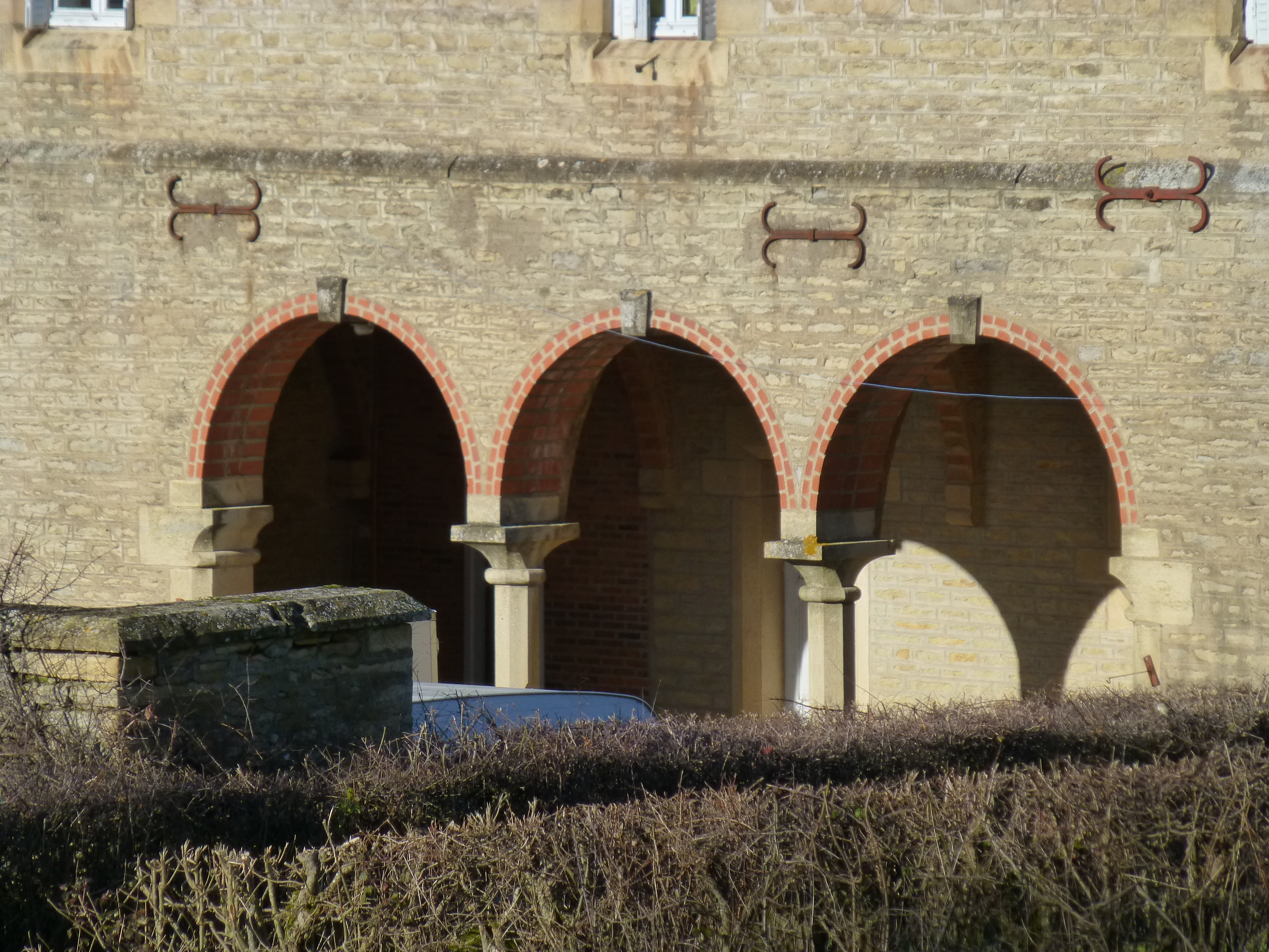 Mairie école mixte (construction de l'architecte François Dulac), détail des arcades.